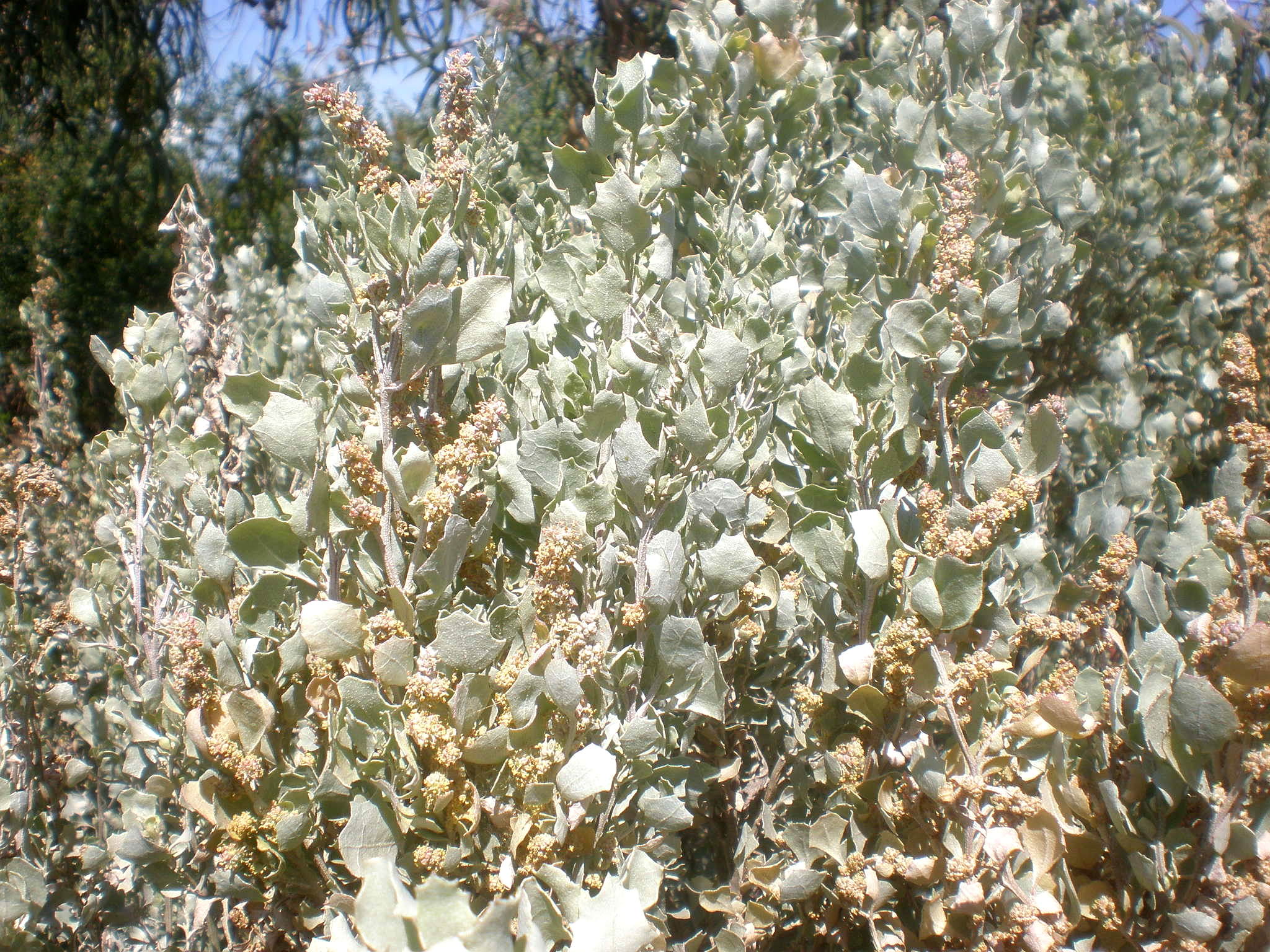 Jardín Botánico de Barcelona.